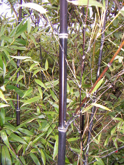 Phyllostachys nigra Jordi Coll Costa 10:53, 14 May 2005 (UTC)